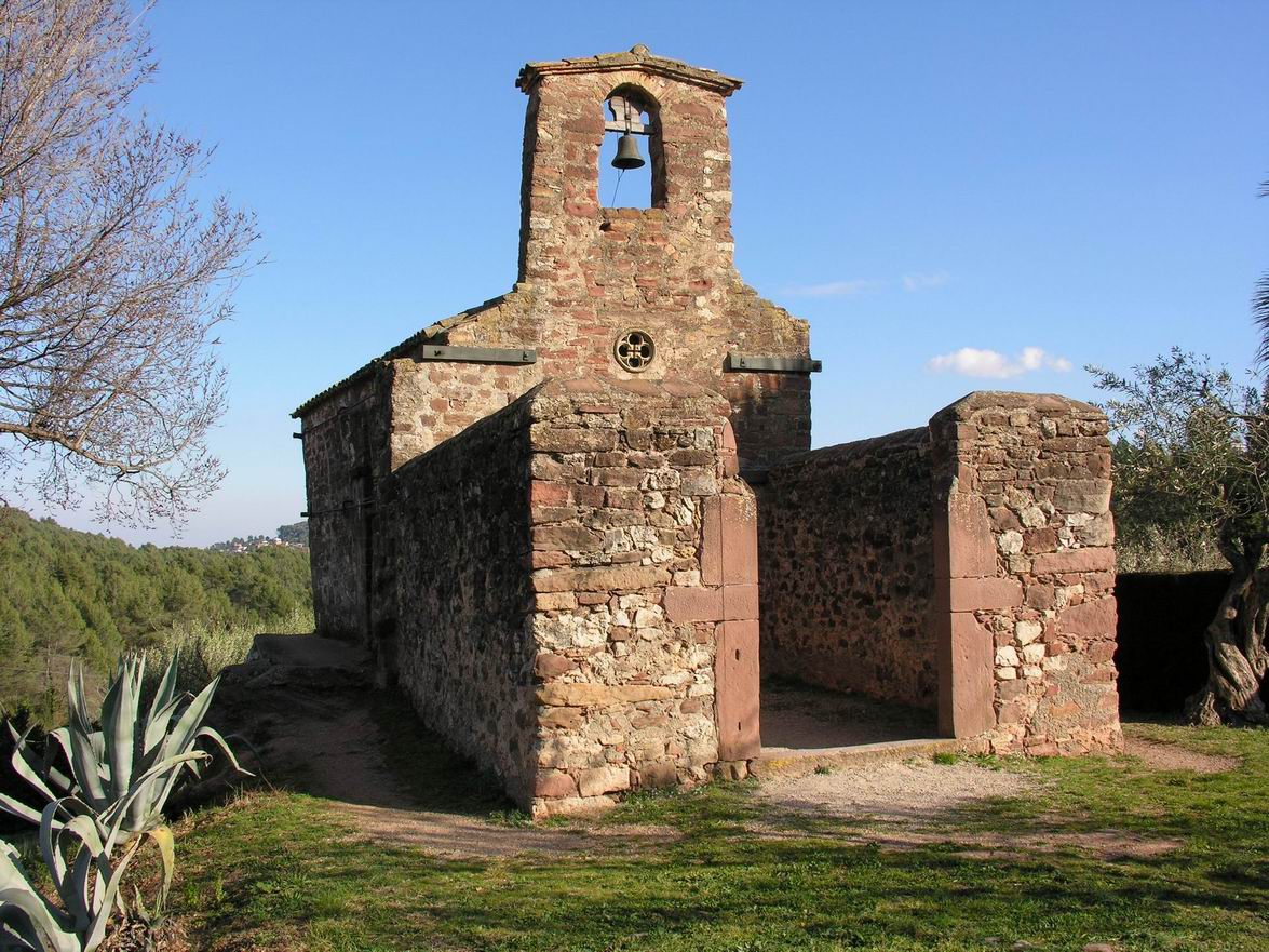 Capella de Sant Cristòfol (S.XI) a Corbera de Llobregat, Barcelona (Espanya).